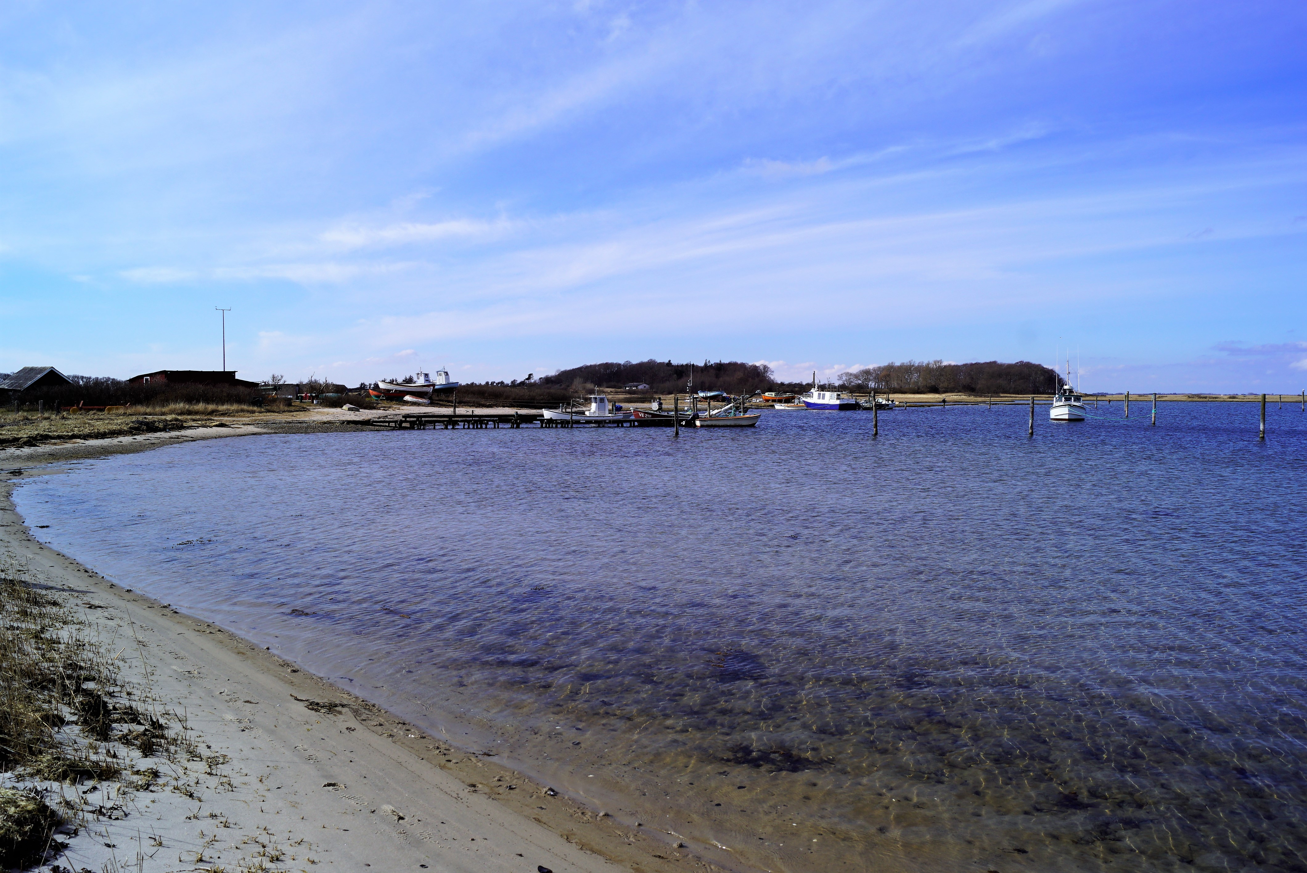 Torø Fiskerlejet set mod vest